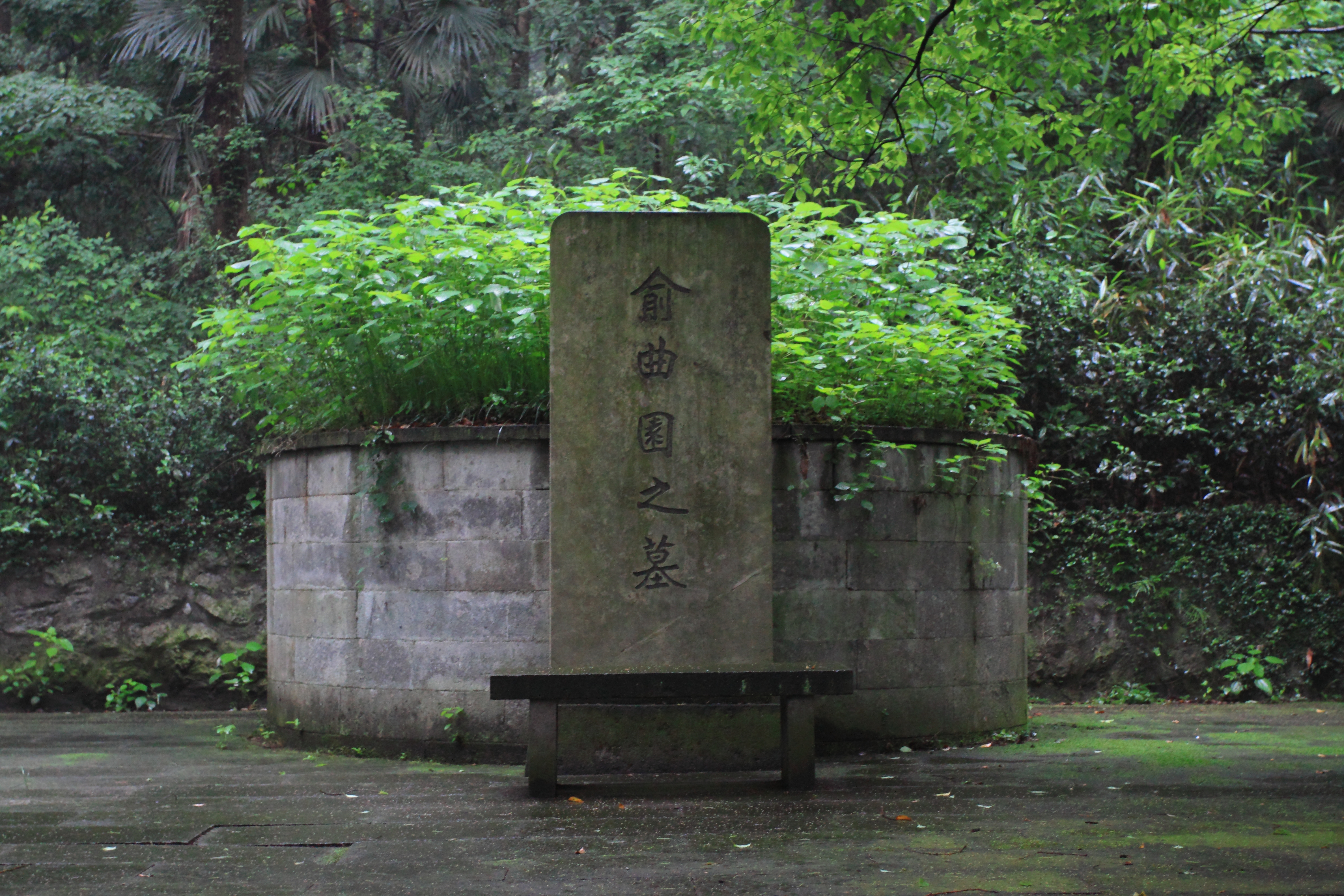 俞樾（曲园）墓，位于中国浙江省杭州市三台山。